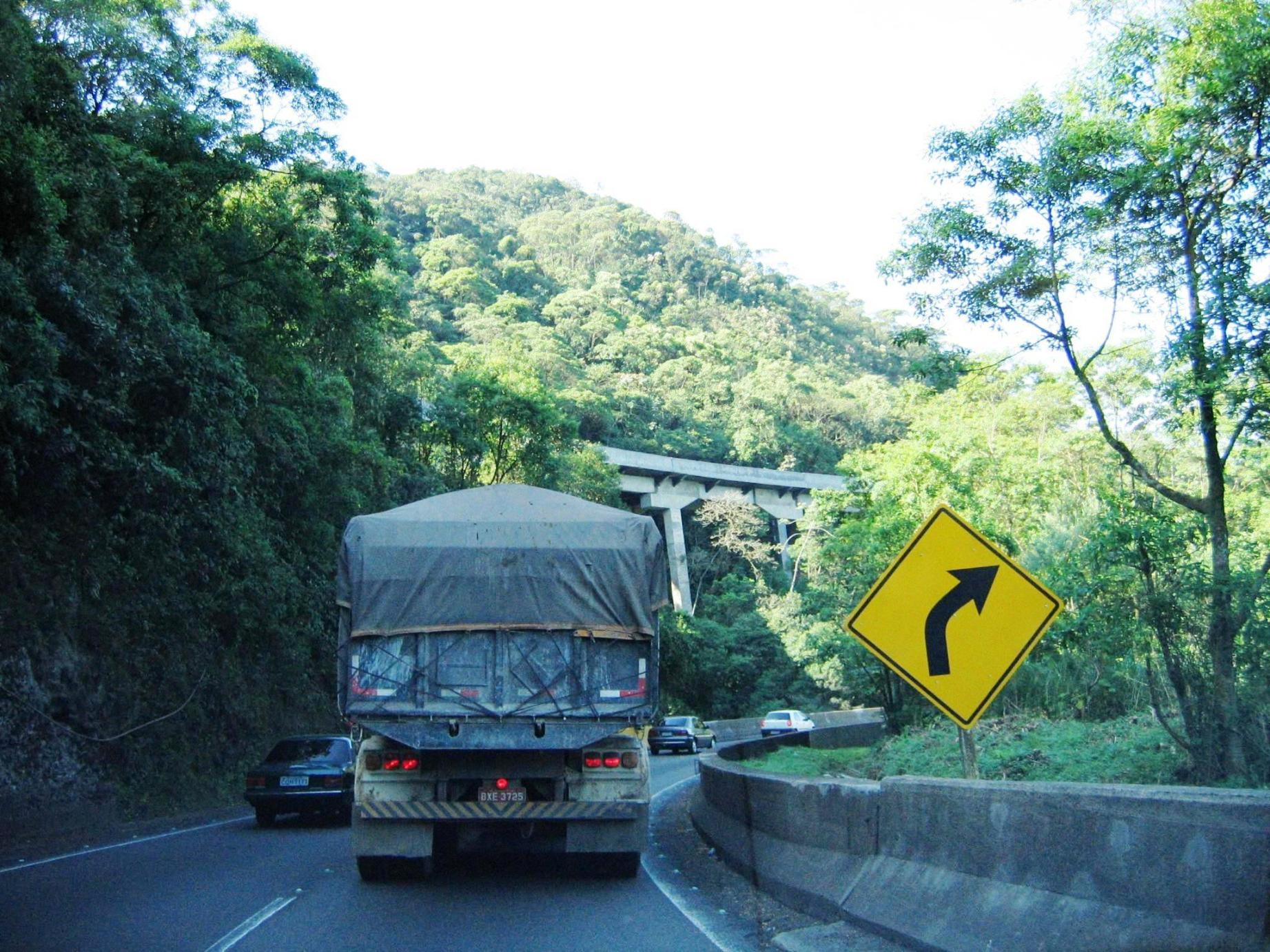 Via Anchieta